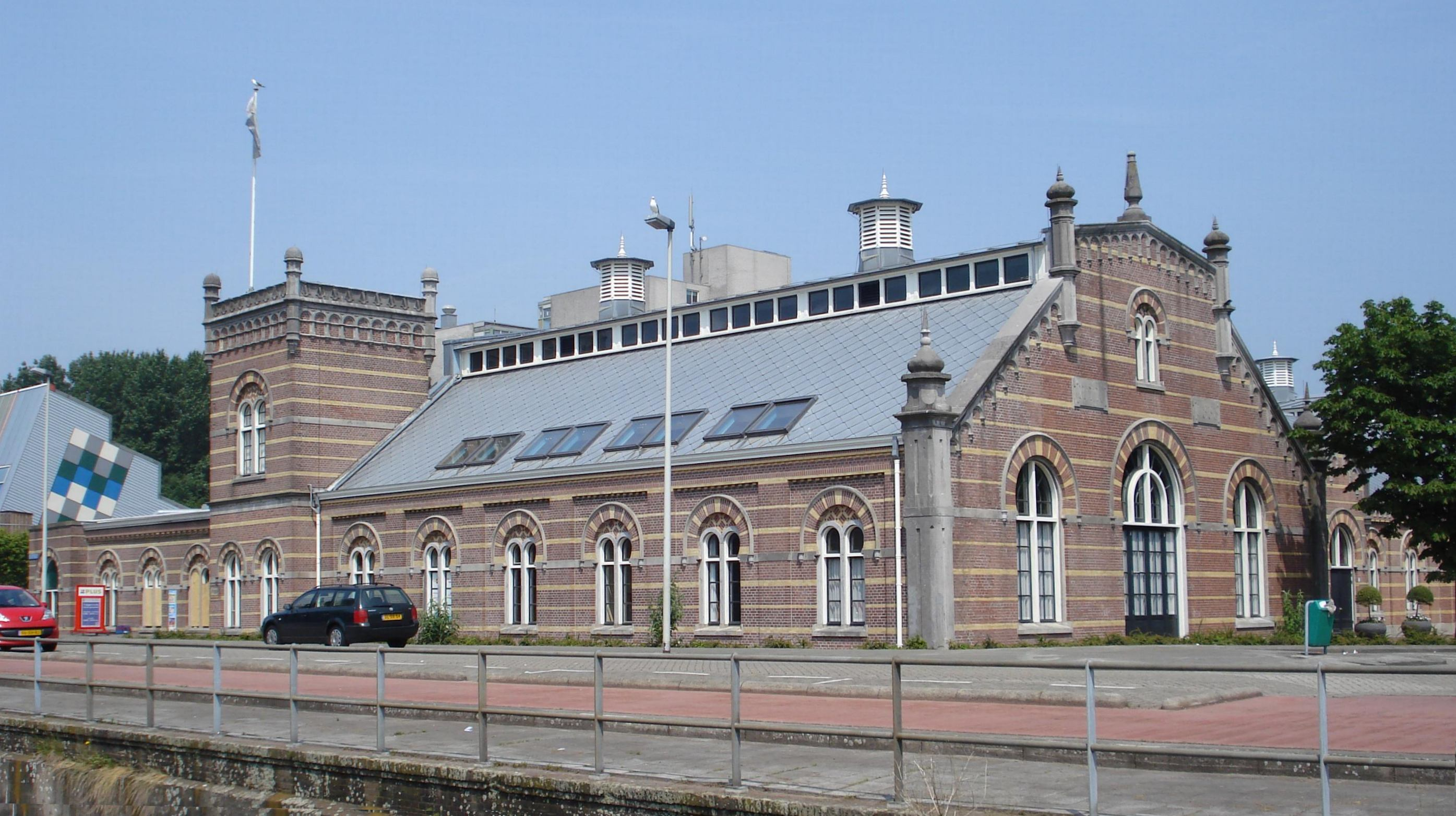 Rotterdam, De Esch. Pompstation bij watertoren. Rijksmonument.